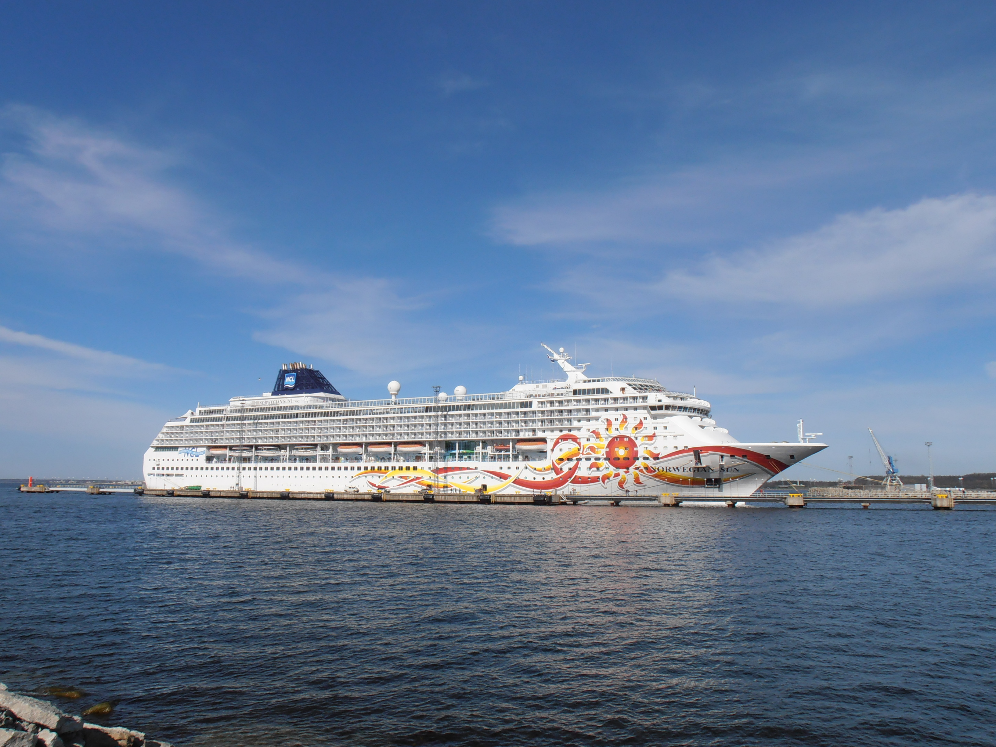 Norwegian Sun am Kai 25 im Tallinner Hafen am 7. Mai 2012